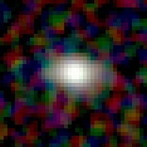 Galaxy NGC 81